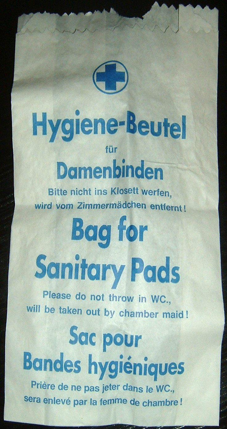 Beutel zur hygienischen Beseitigung von Binden etc.